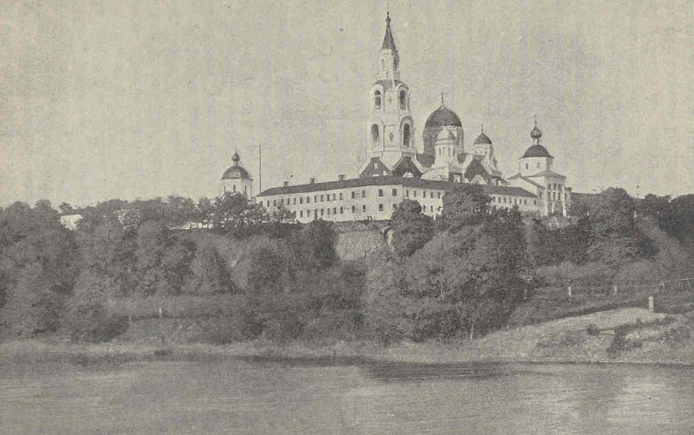 Valamo kloster